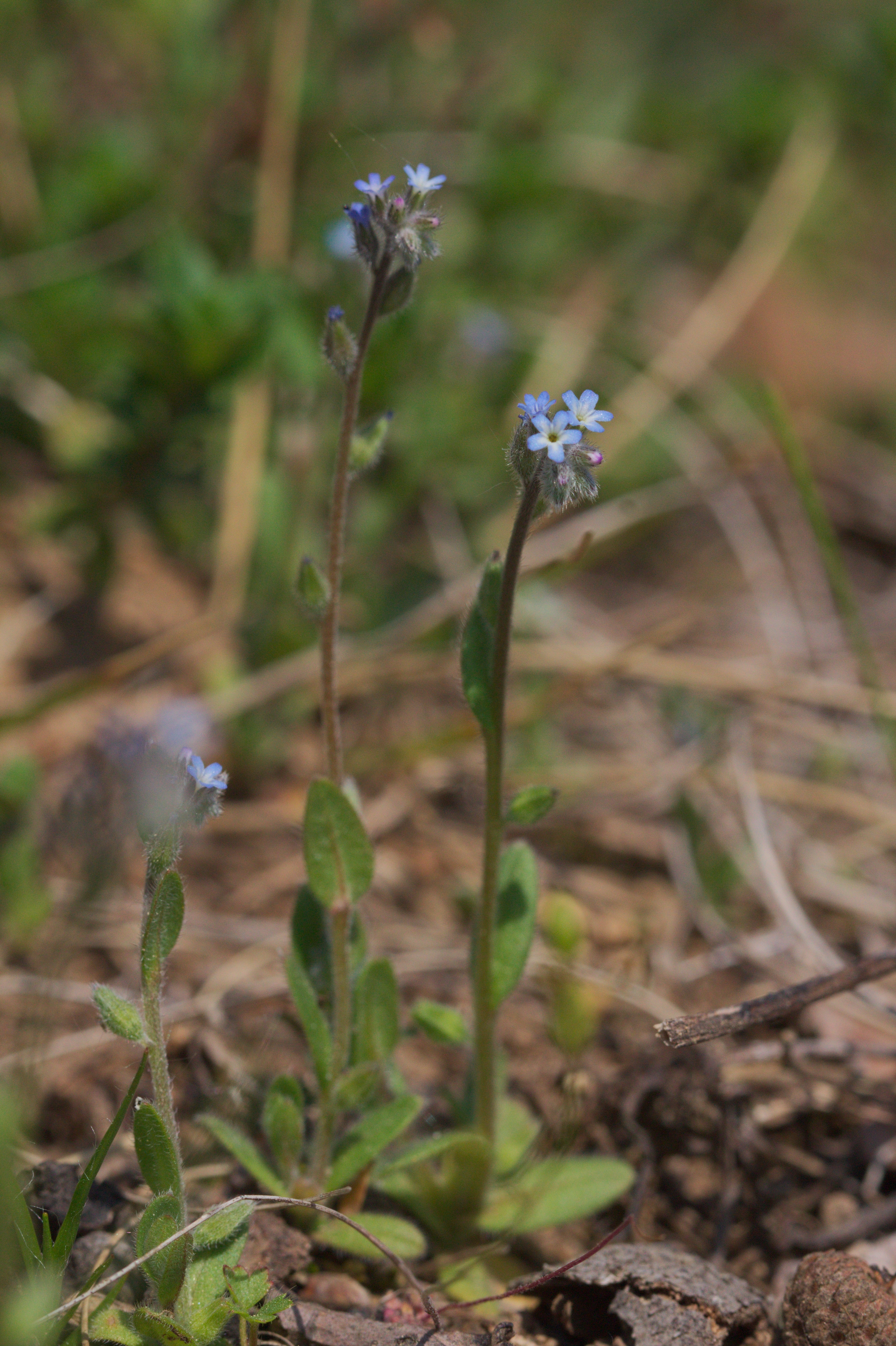 Na Stráži (přírodní památka) - Myosotis stricta Roem. et Schult., pomněnka drobnokvětá - status ohrožení v ČR: není